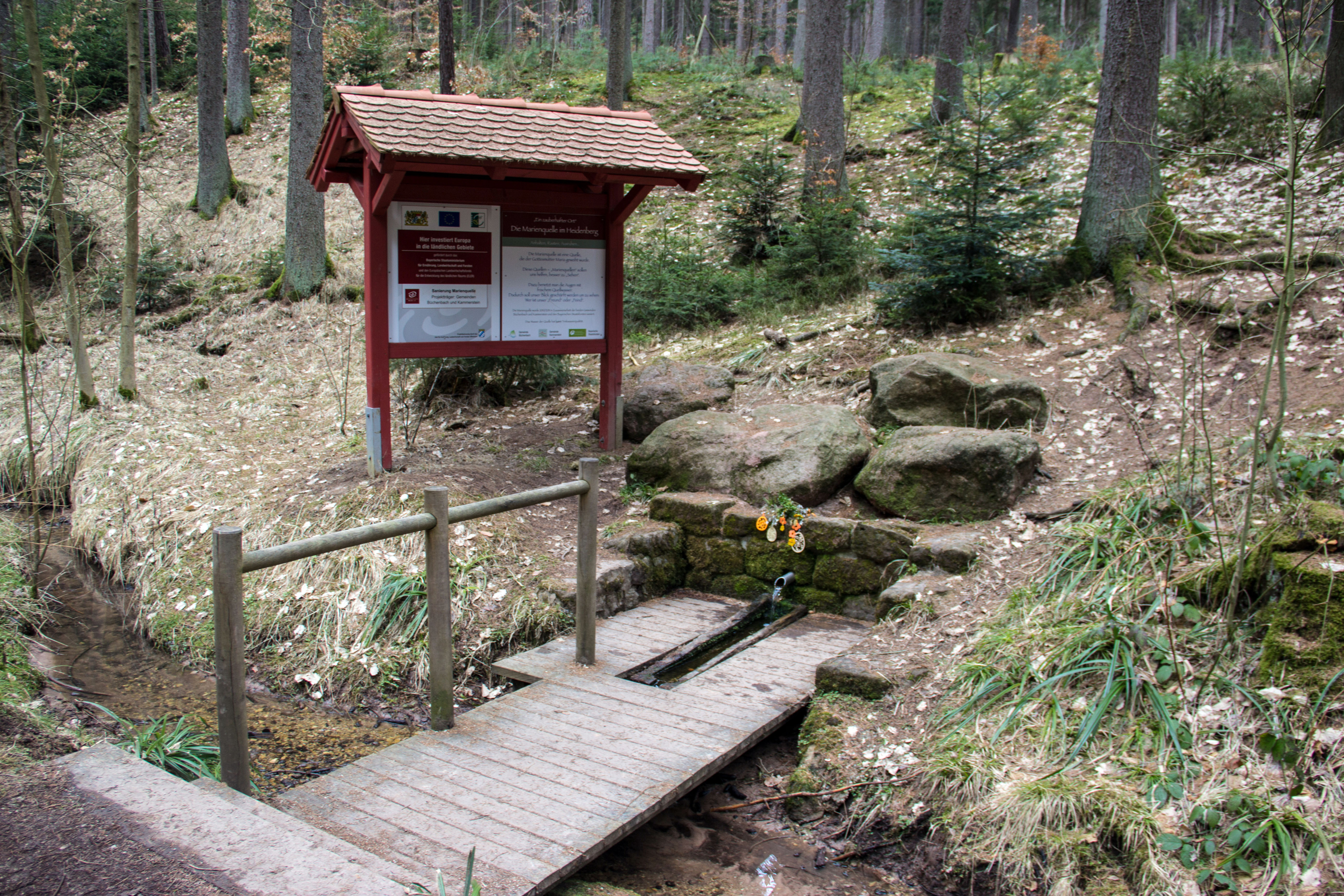 Marienquelle, Sagenweg, Kühedorf